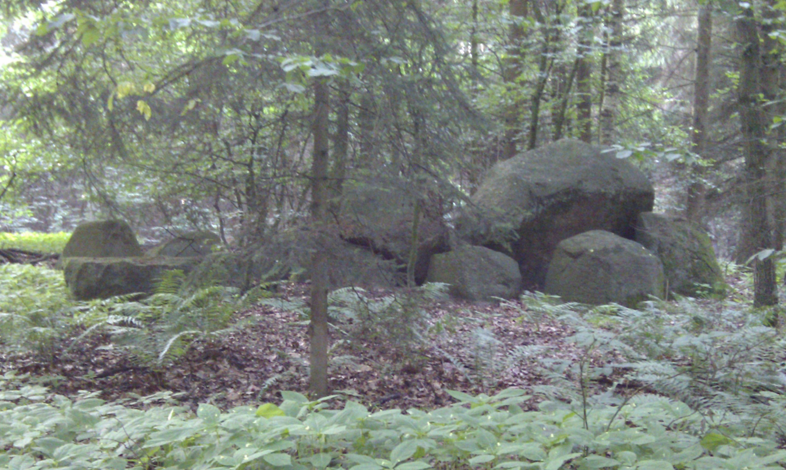 Poggendorfer Forst Großdolmen 1 (nach E Schuldt, Dolmenlandschaft an der Schwinge, Schwerin 1970)